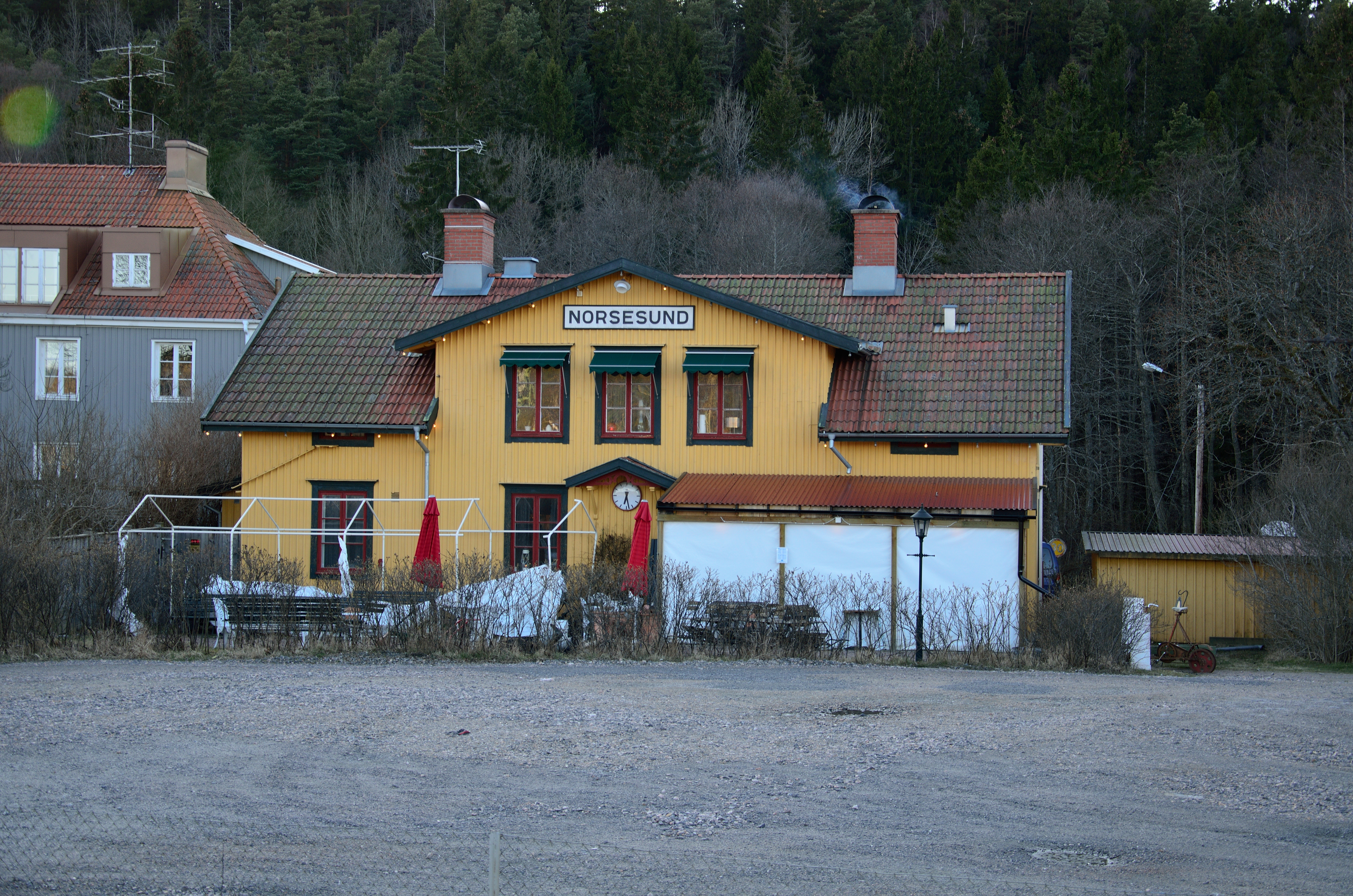 Norsesunds stationshus